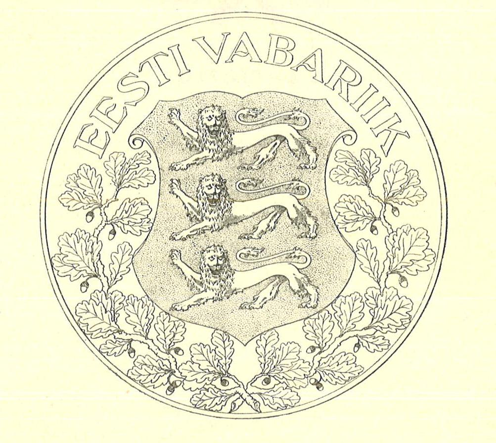 Aastail 1925–1940 kasutatud riigipitser